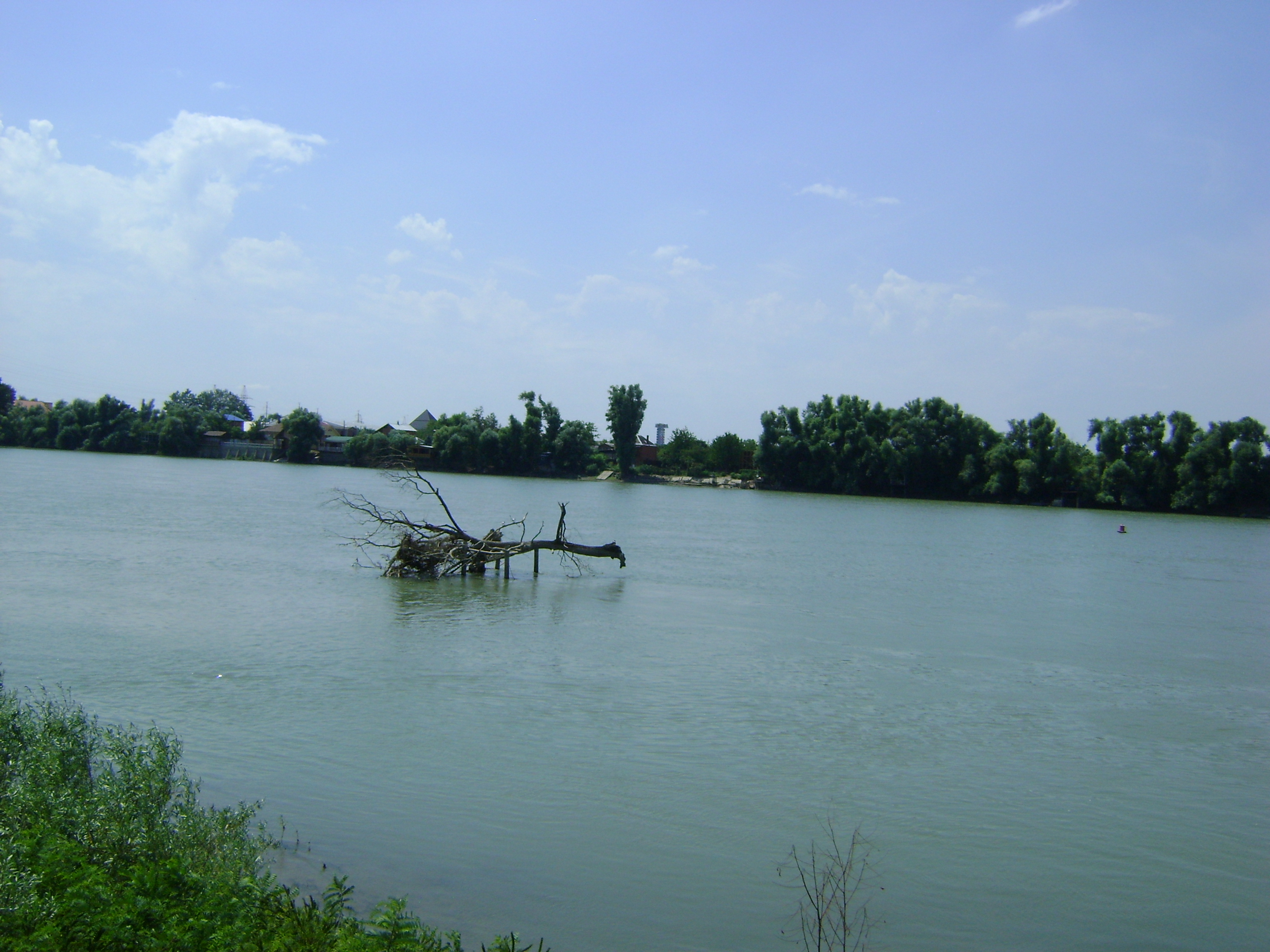 Вид з гаю за міським парком.